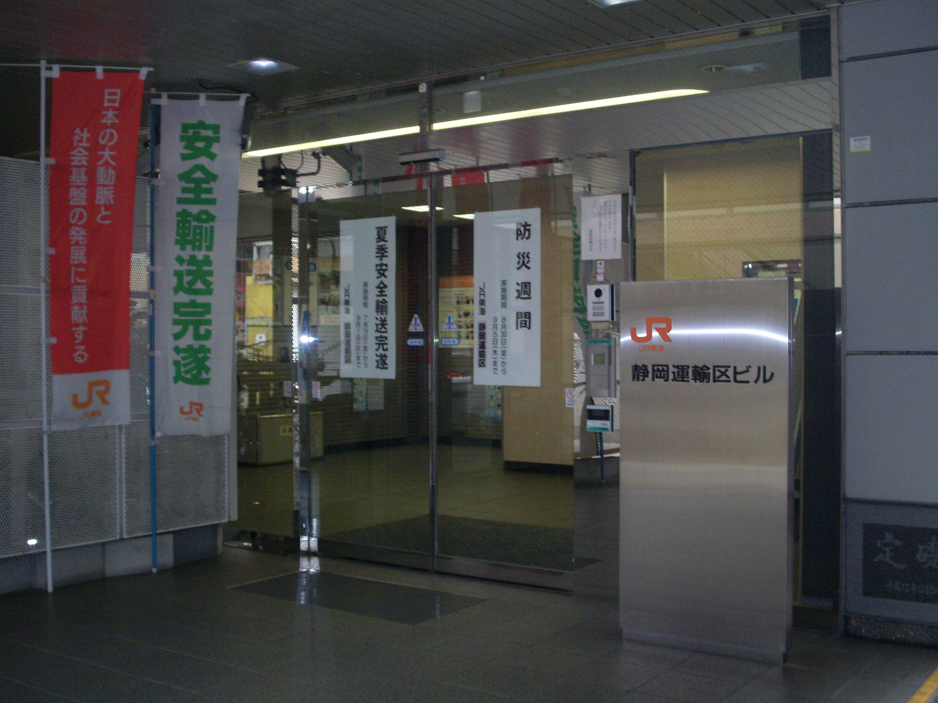 JR東海静岡運輸区ビルのエントランス Caution:Sorry！Built-in clock error!!